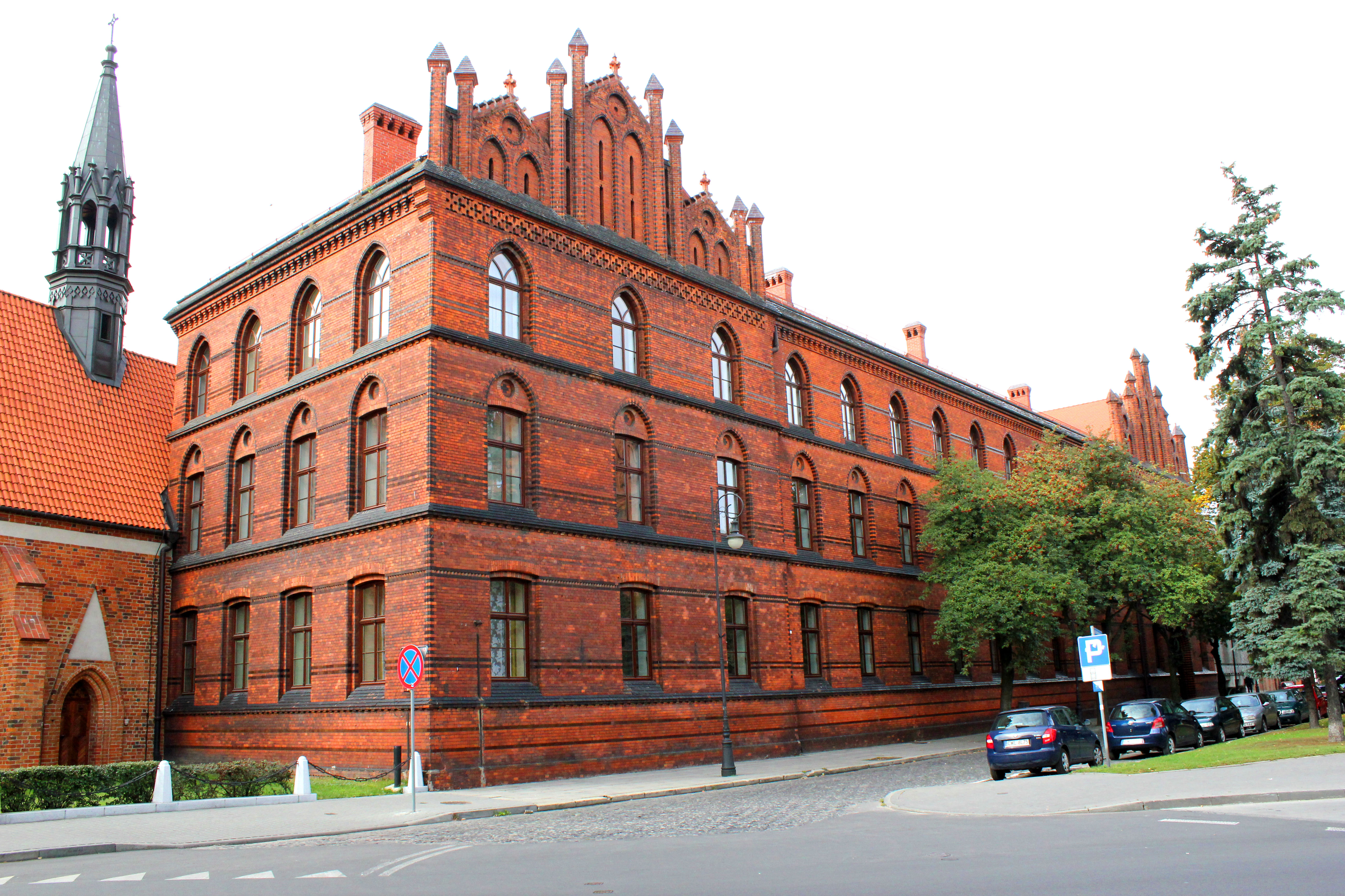 zespół Wyższego Seminarium Duchownego: gmach seminarium (4 skrzydła), 1843-1900 Włocławek, ul. Karnkowskiego 3, miasto Włocławek